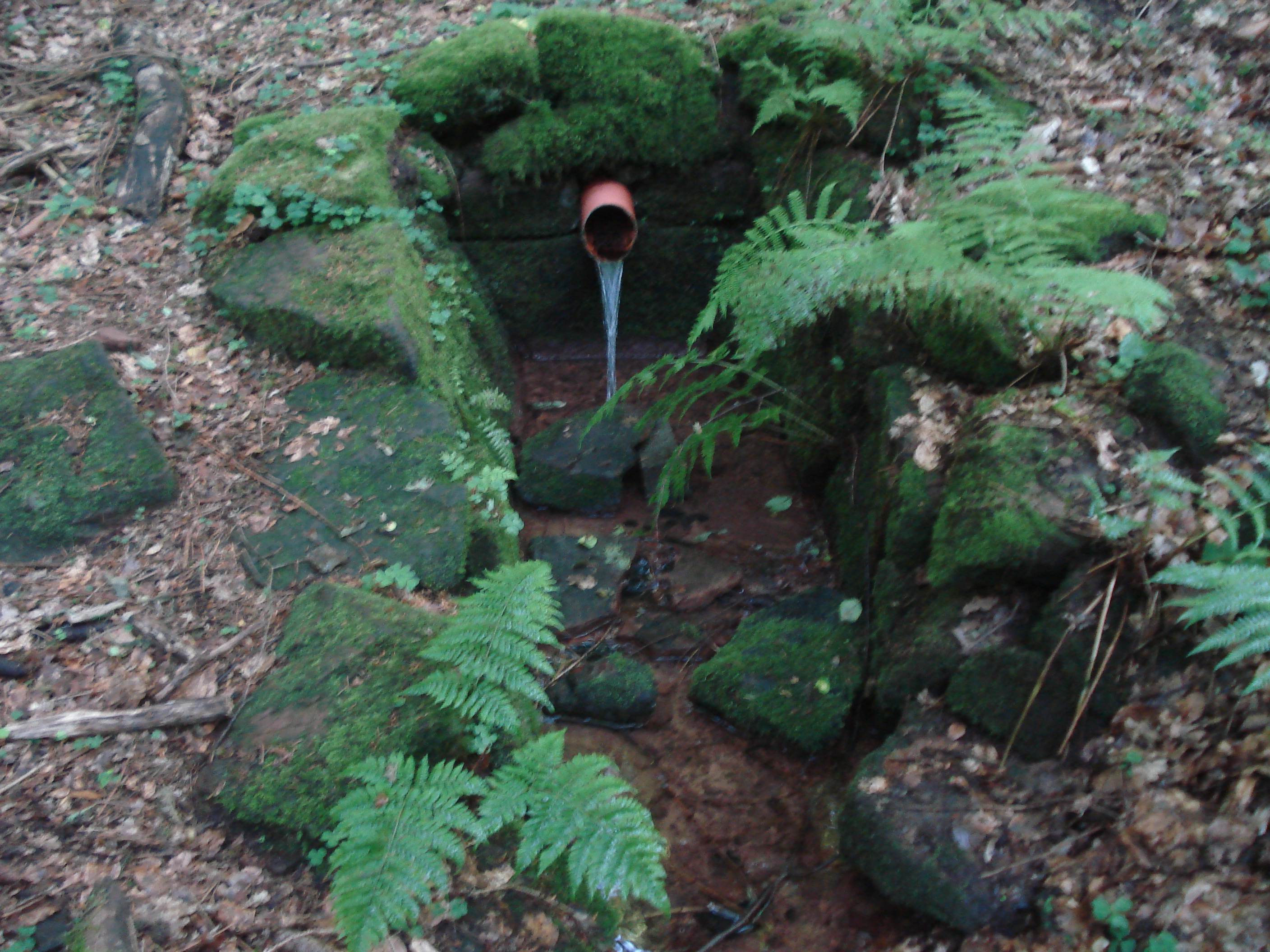 Der Wintersbachbrunnen, die Quelle des Wintersbachs